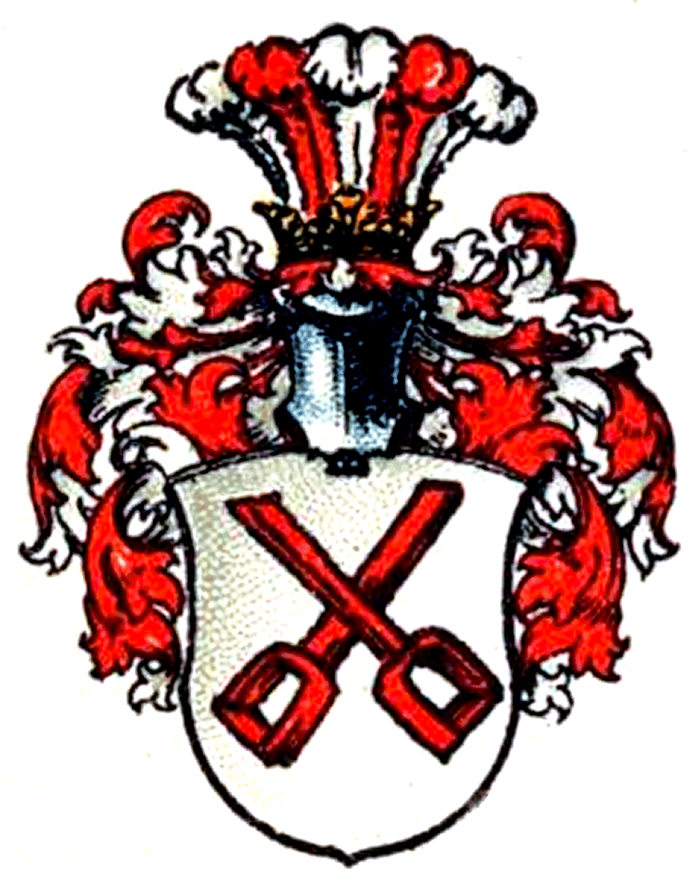 Wappen derer von Steinwehr